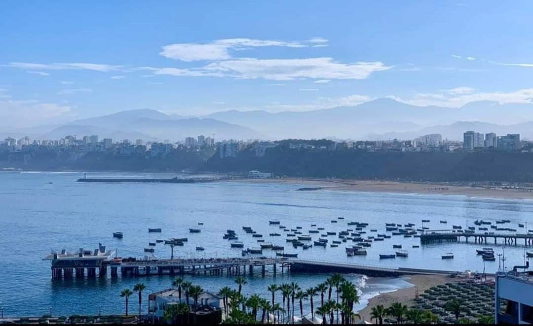 Playas de Lima en 9no dia de cuarentena